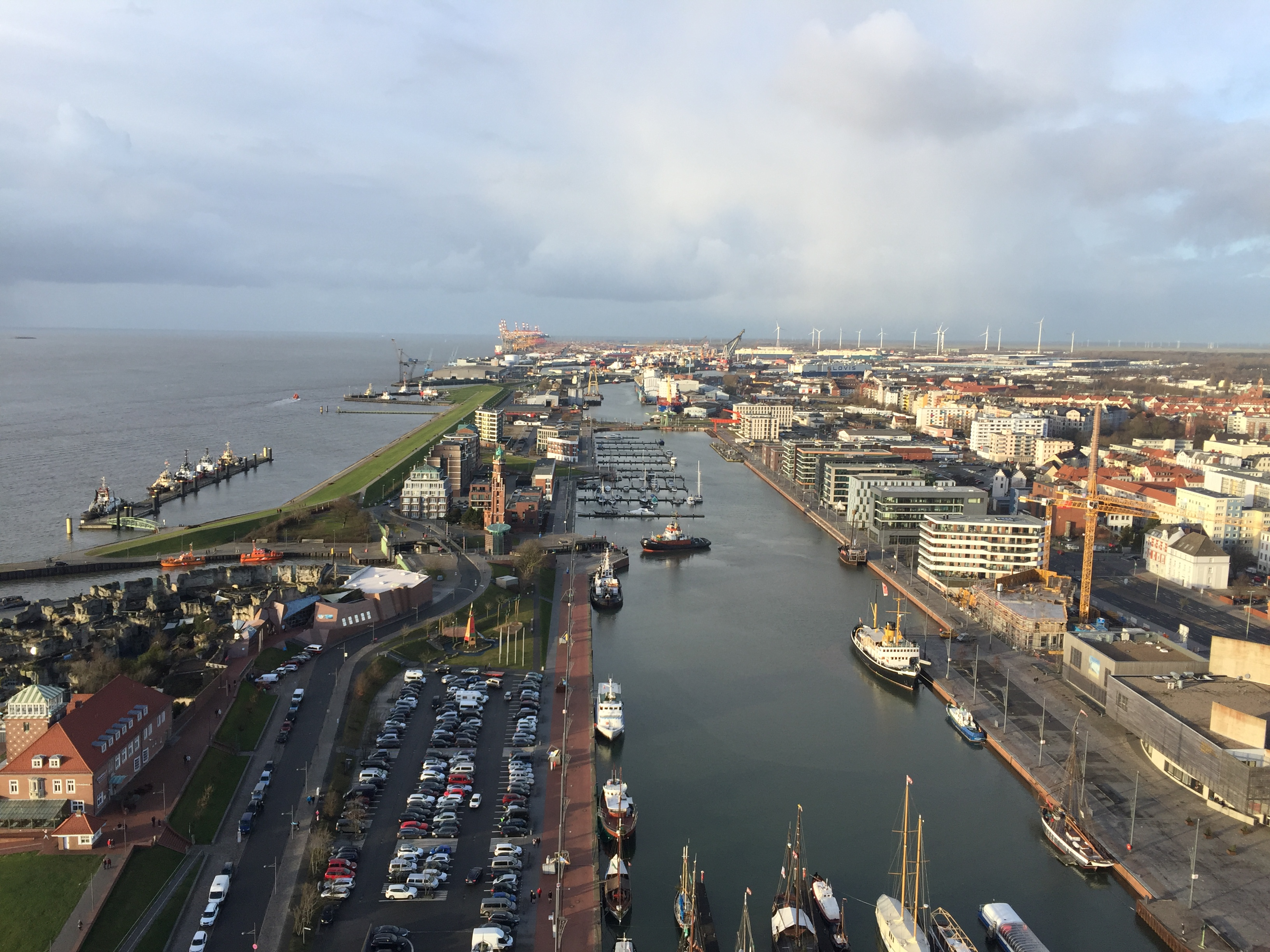 Blick vom Atlantic Hotel Sail City in Bremerhaven in Richtung des Alten Hafens